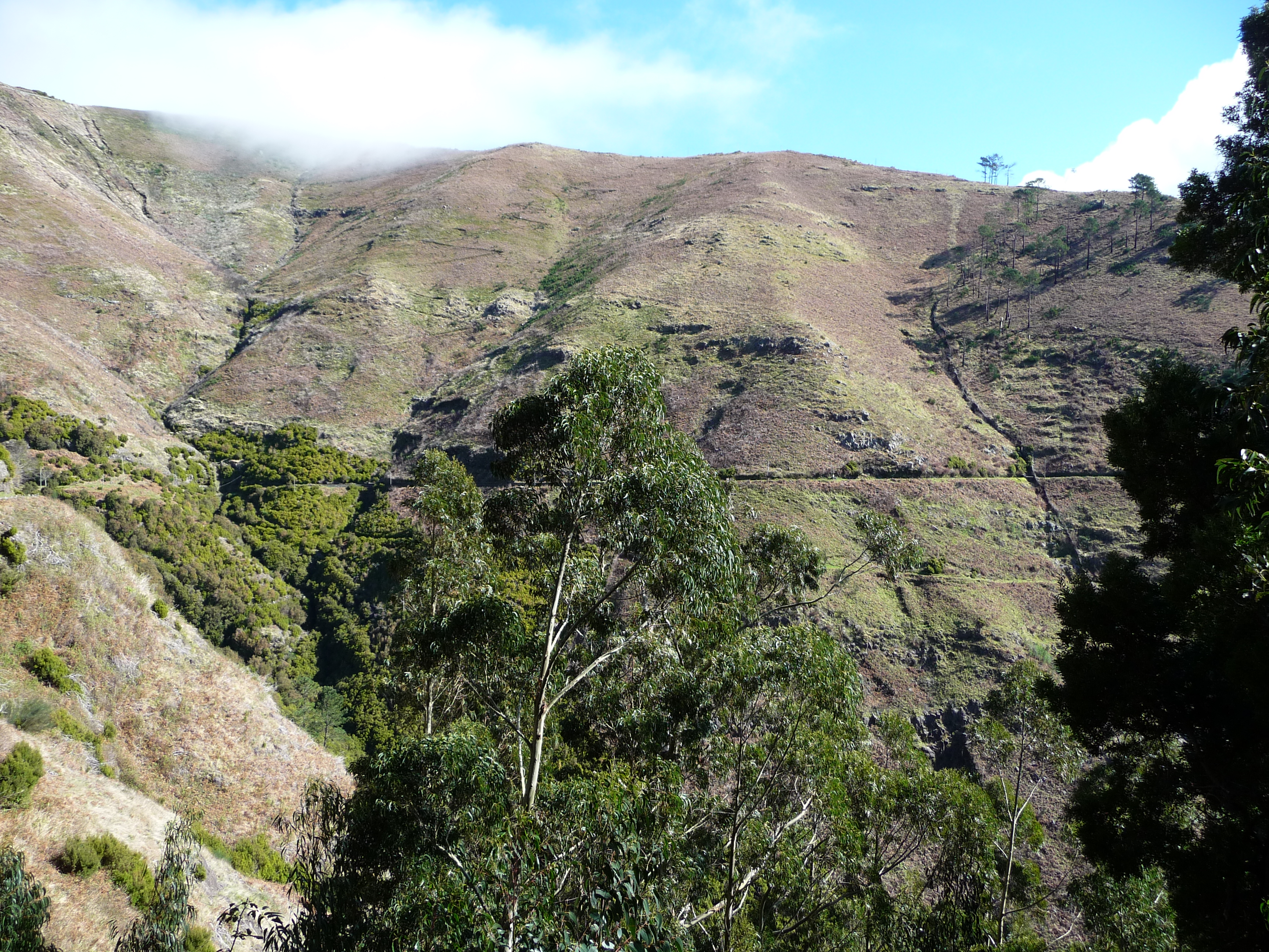 A Calheta vízierőművét ellátó Levada Nova (Madeira, a Ribeira Calheta völgyében)